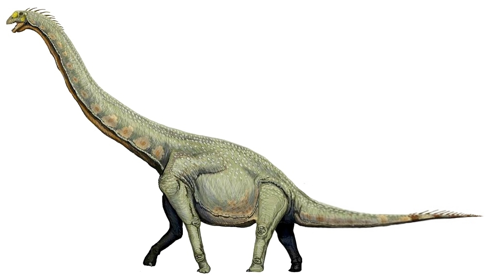 Euhelopus - Bogdanov